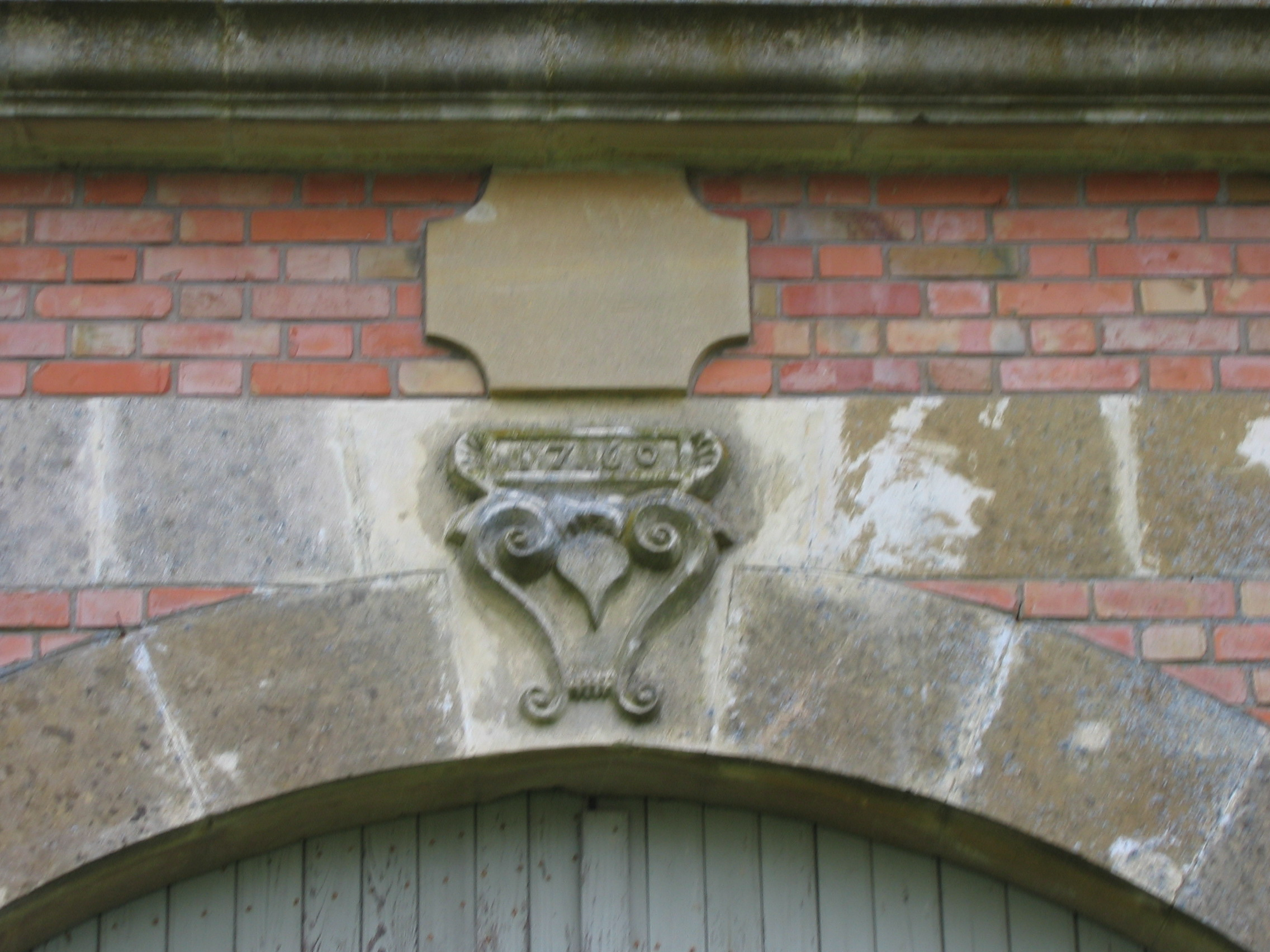 date porte charretiere château Marcq Ardennes France